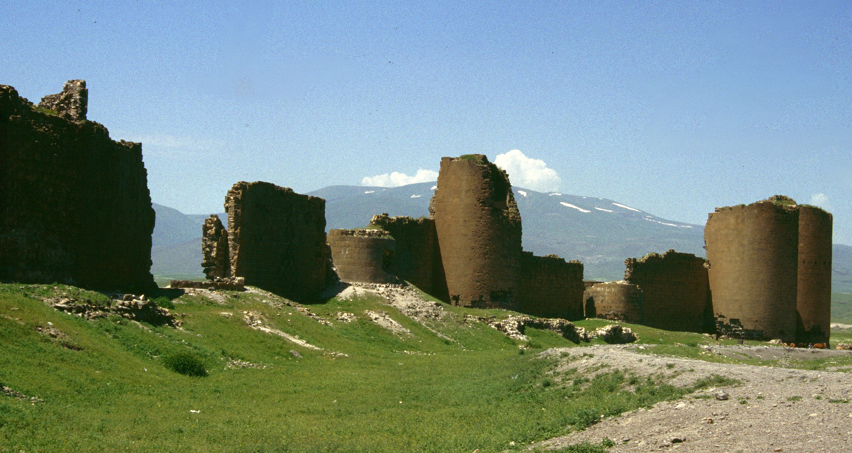 Ani: Stadtmauer